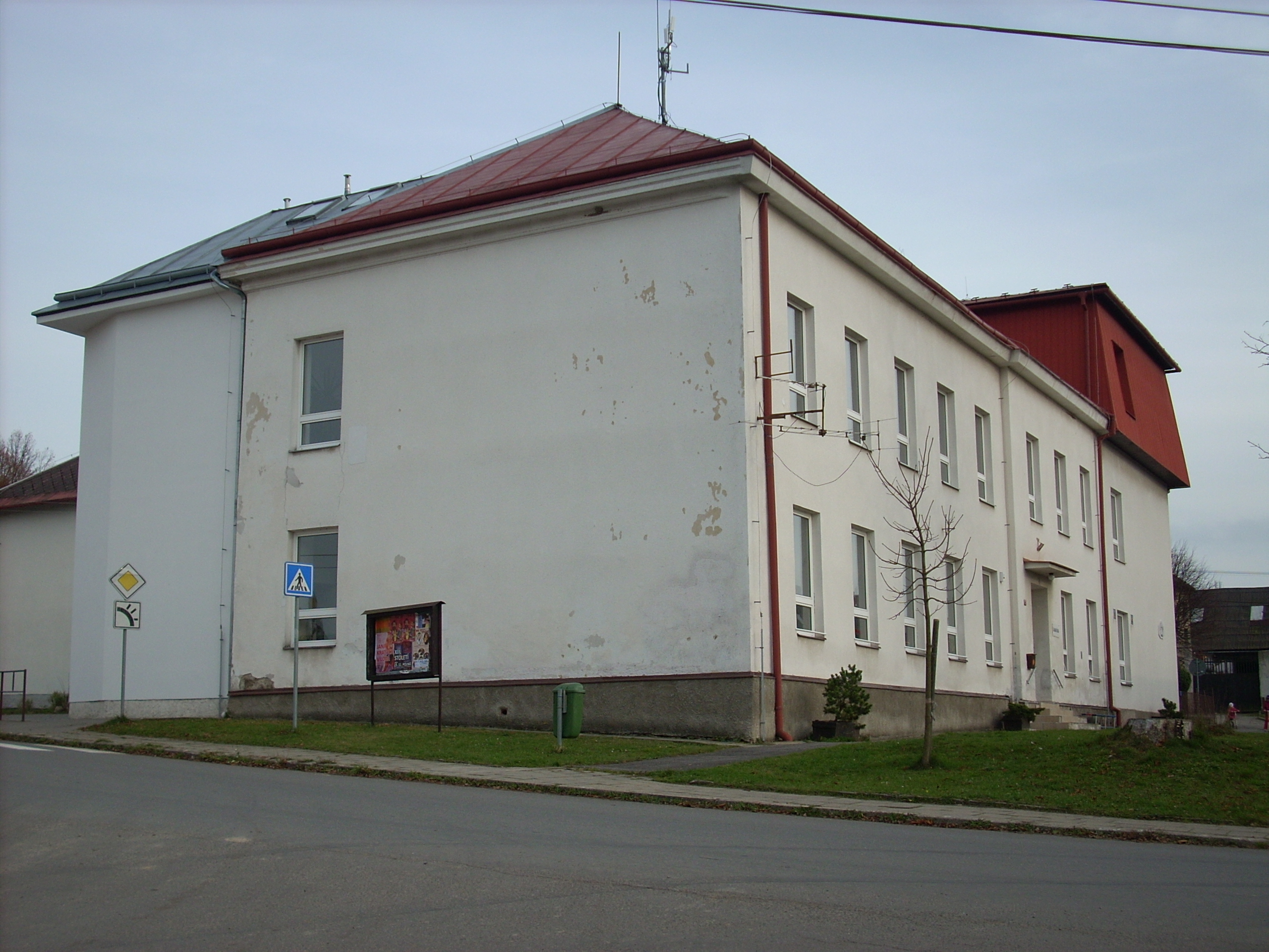 Nížkov, základní škola